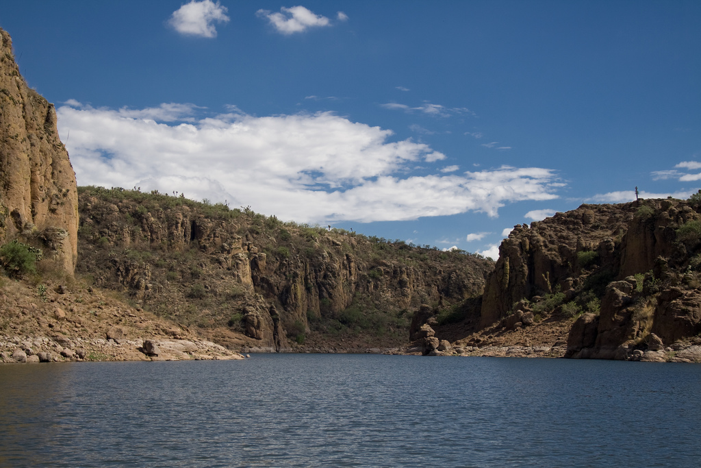 Boca de Tunel en San José de Gracia, Aguascalientes, México